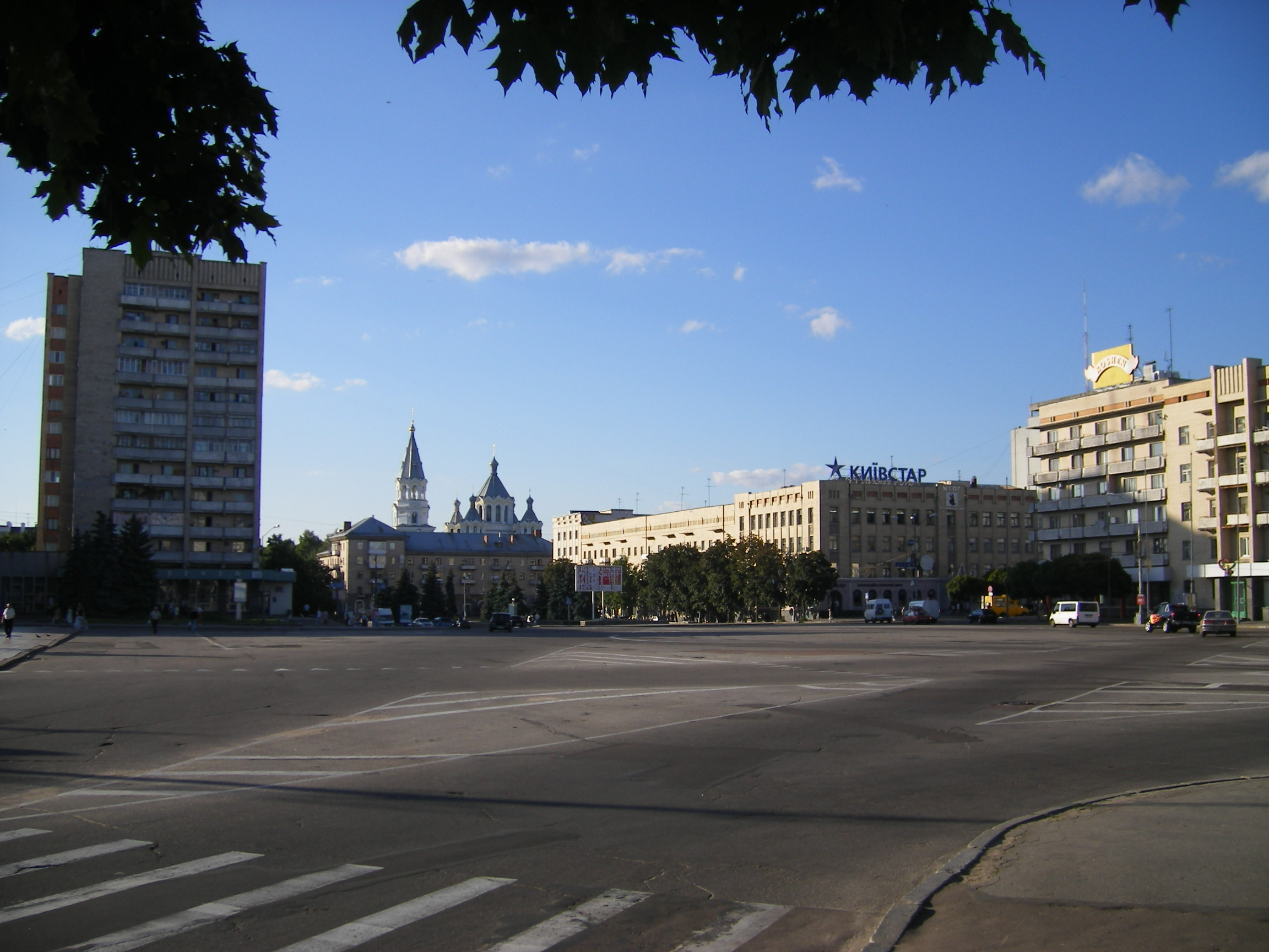 Zhytomyr, Sobornyy Maydan